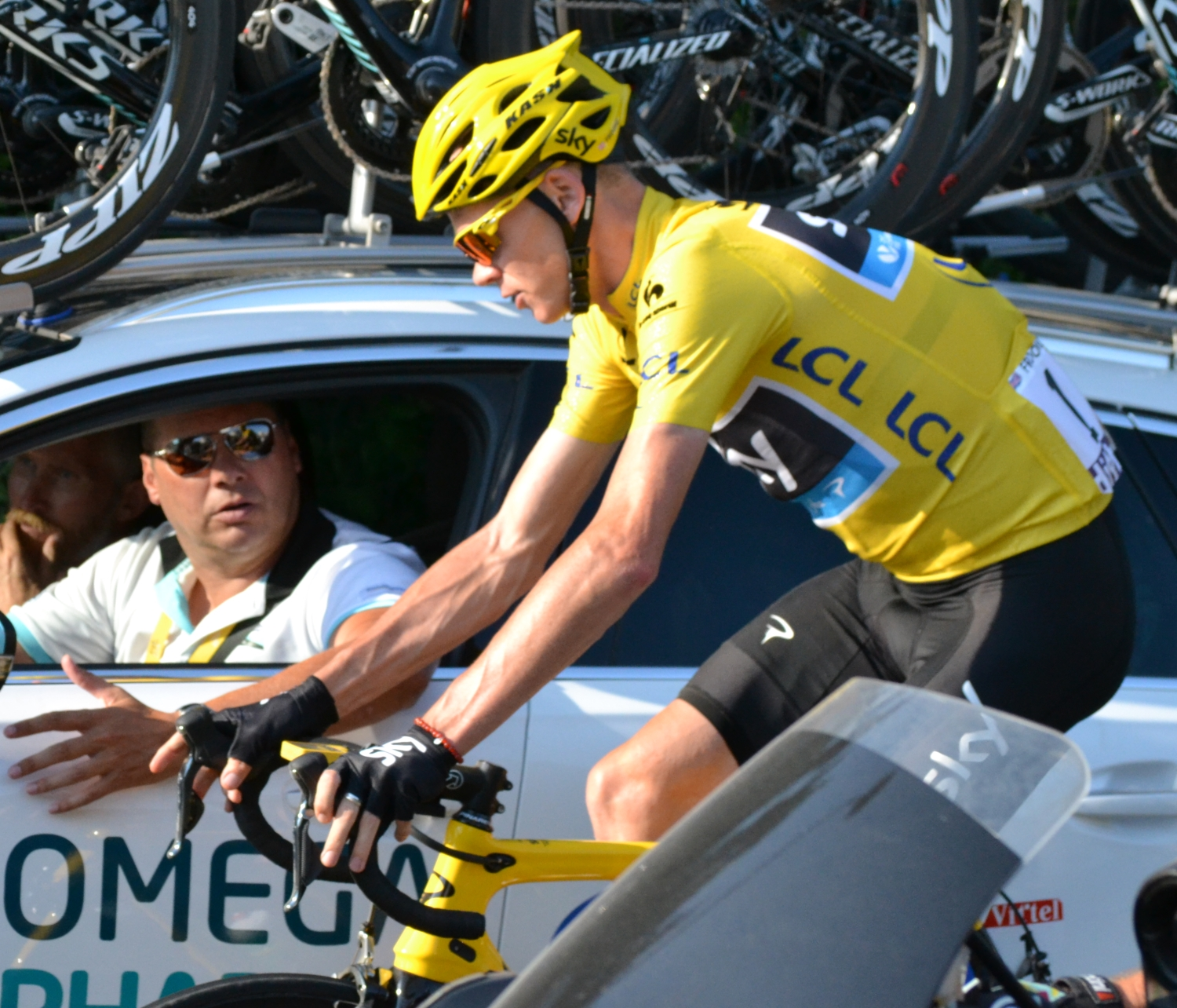 Chris Froome durant la dernière étape du Tour